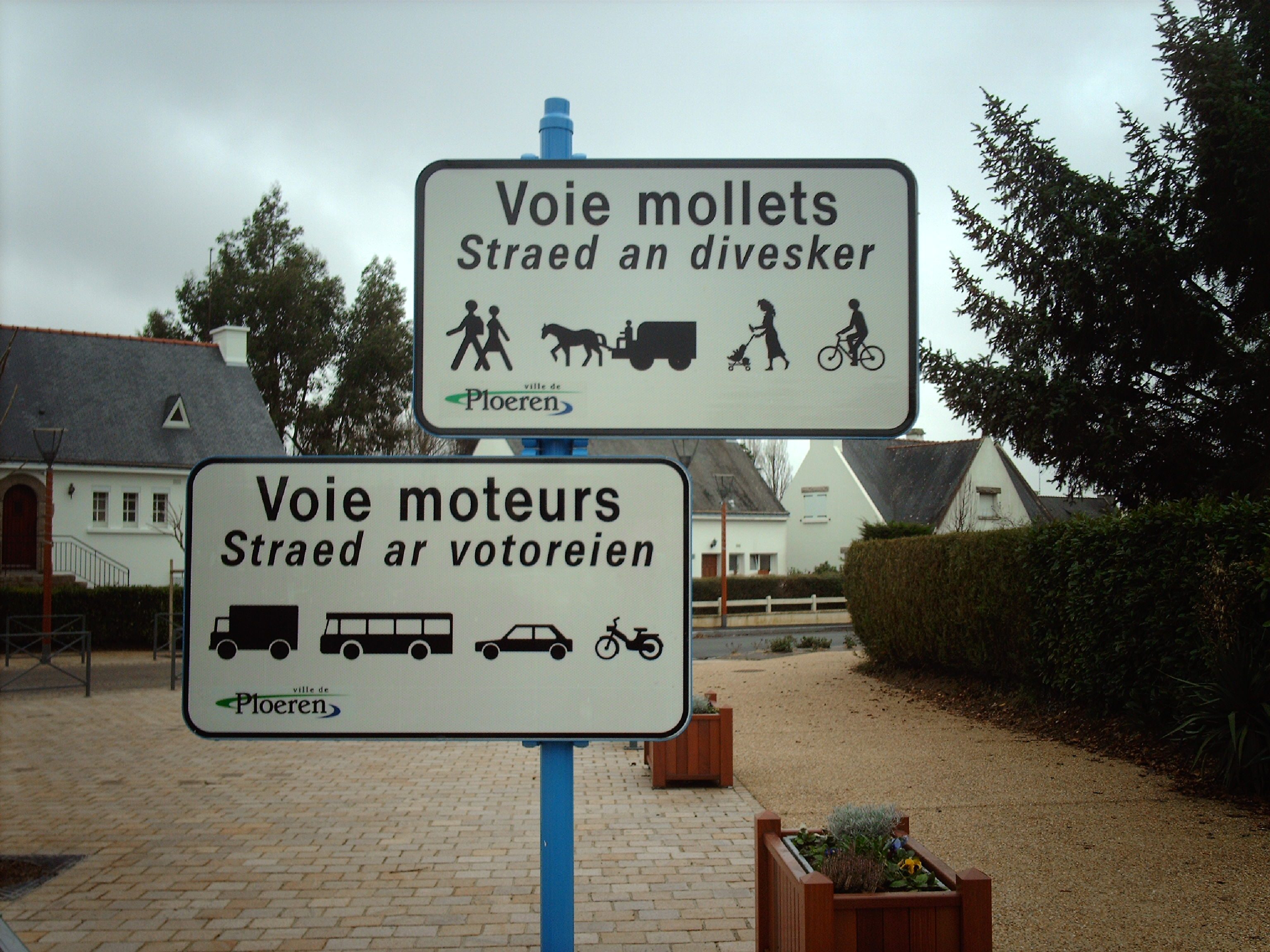 Panneaux indicatifs des voeis 2 M Ploeren(56)